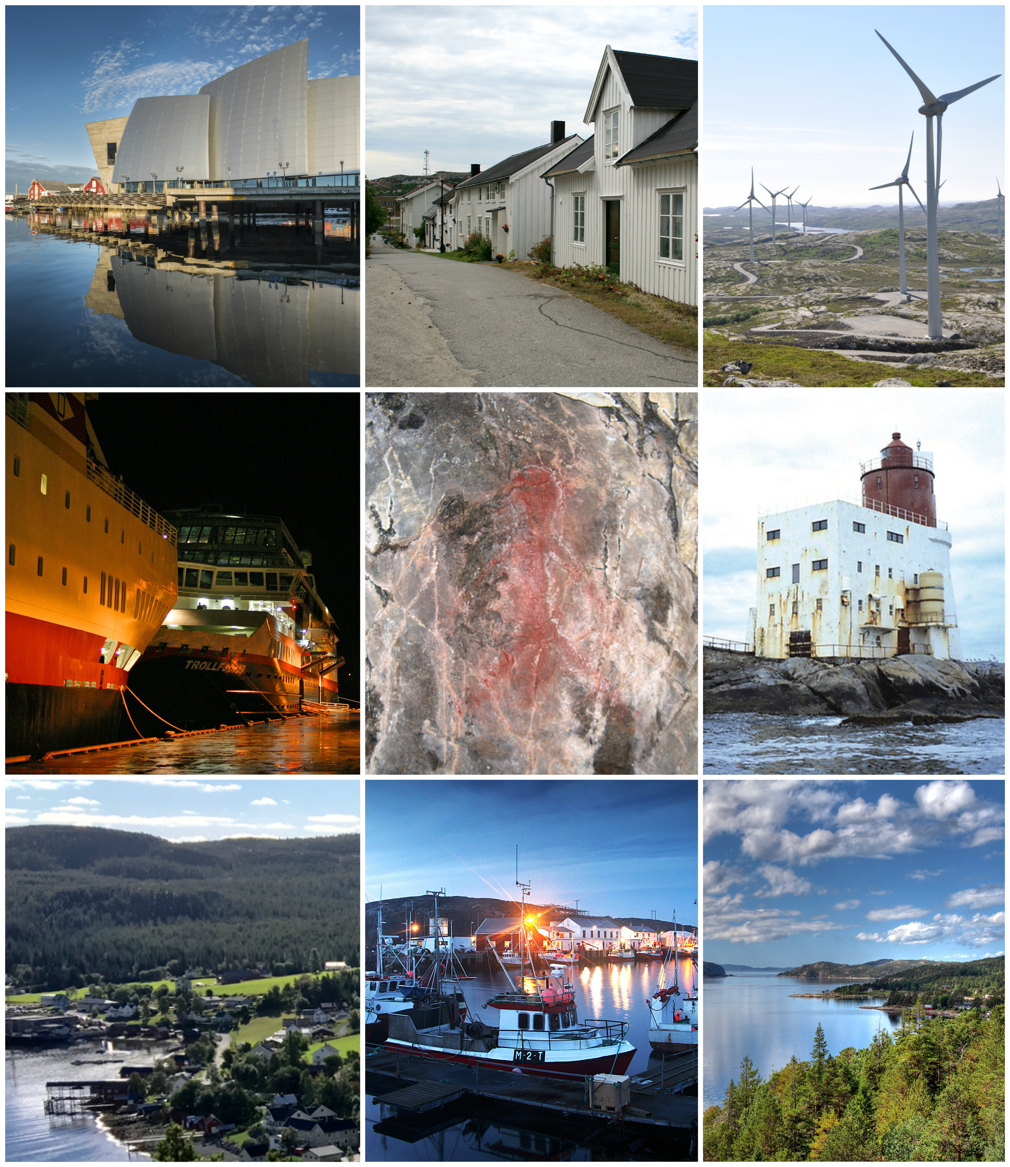 Collage med motiver fra Nærøysund kommune (fra 2020) (nå Nærøy og Vikna kommuner).